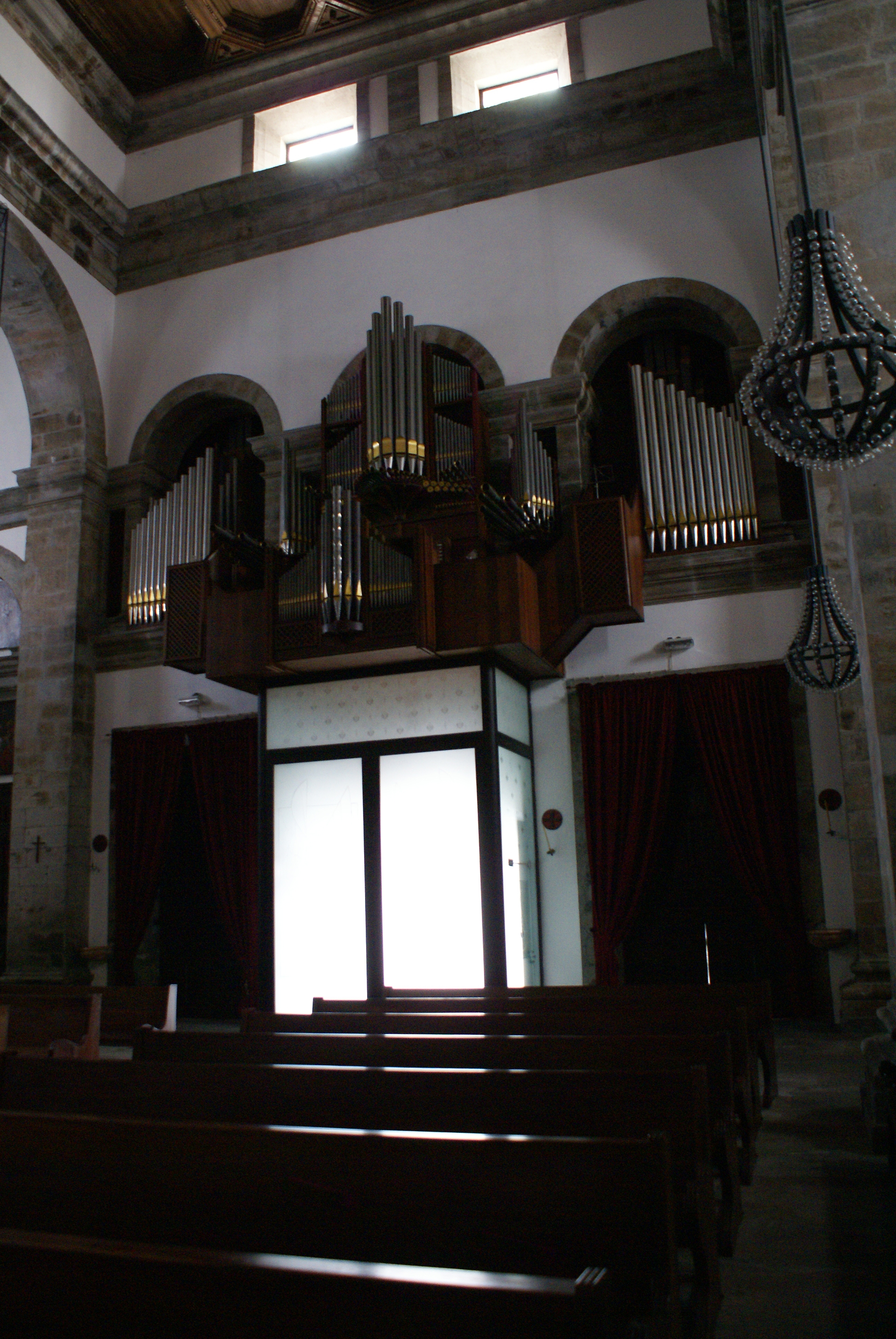 Órgão de tubos, Sé Catedral de Angra do Heroísmo, Açores, Portugal